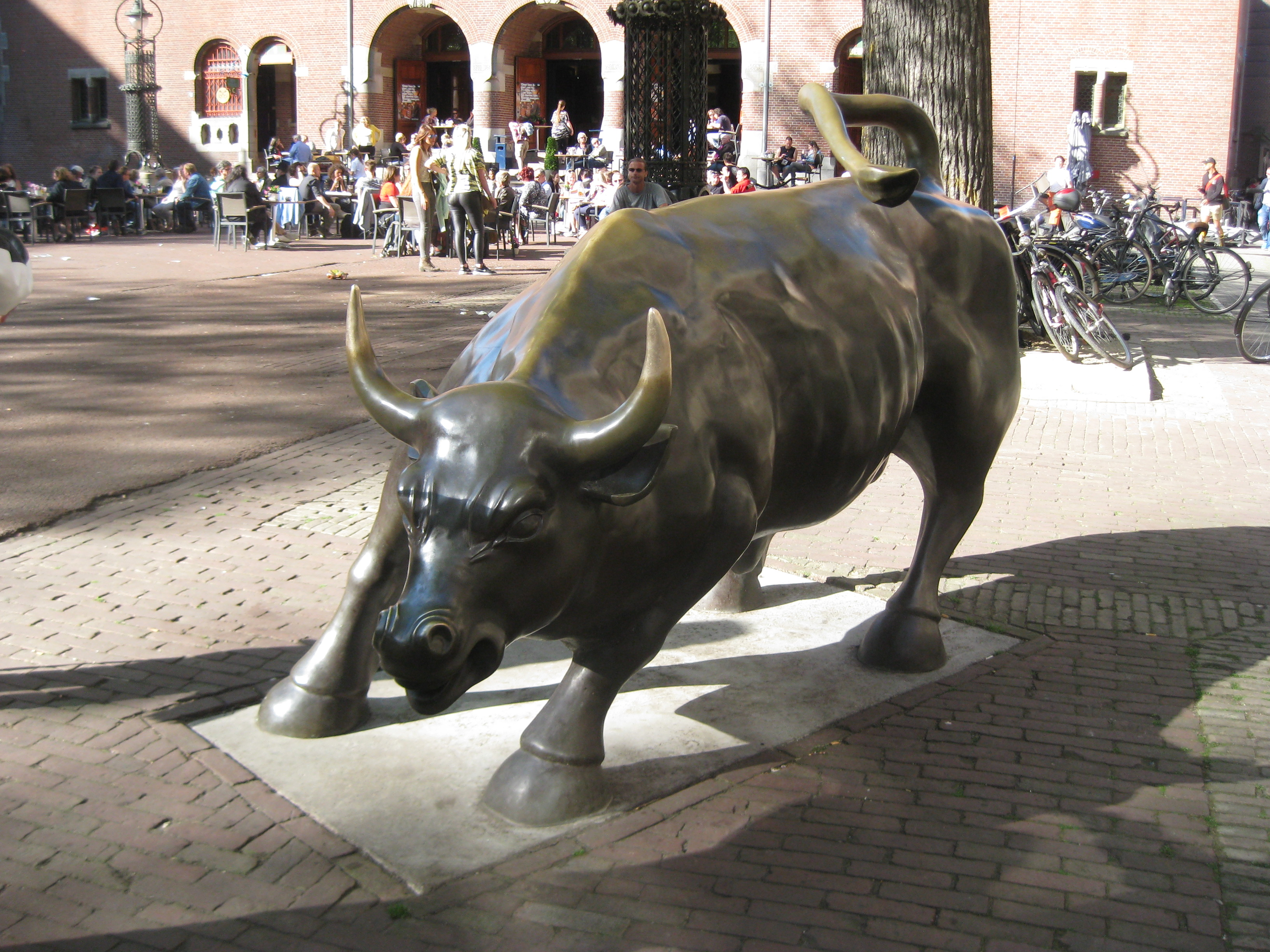 Bronzen stier op het Beursplein, Amsterdam. Kunstenaar Arturo Di Modica. 2012